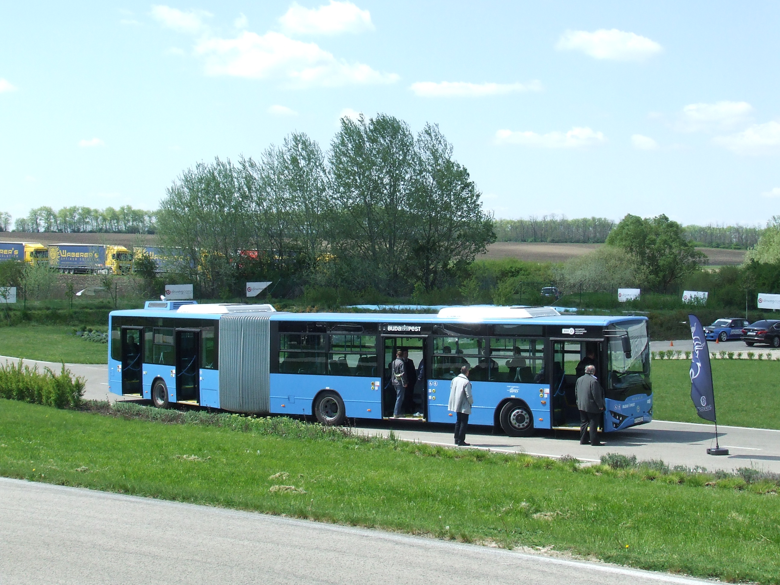 Busexpo 2016, Zsámbék